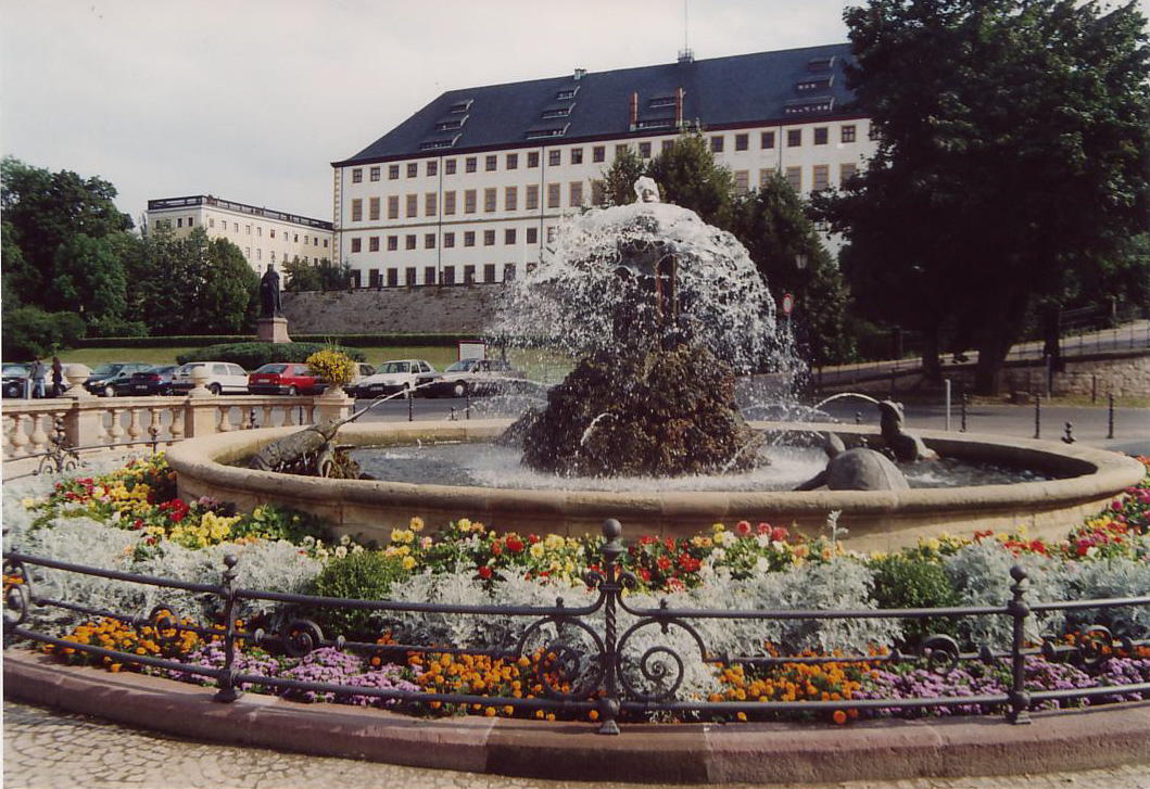 Gothaer Wasserkunst mit Blick auf Schloss Friedenstein